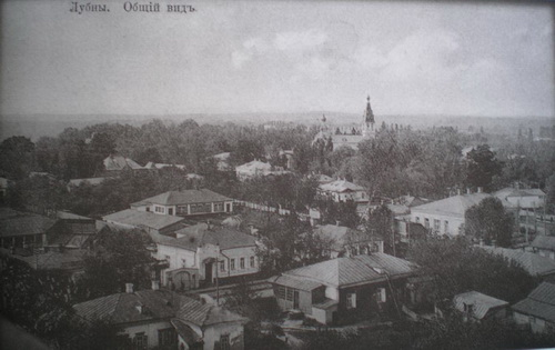 Давні Лубни